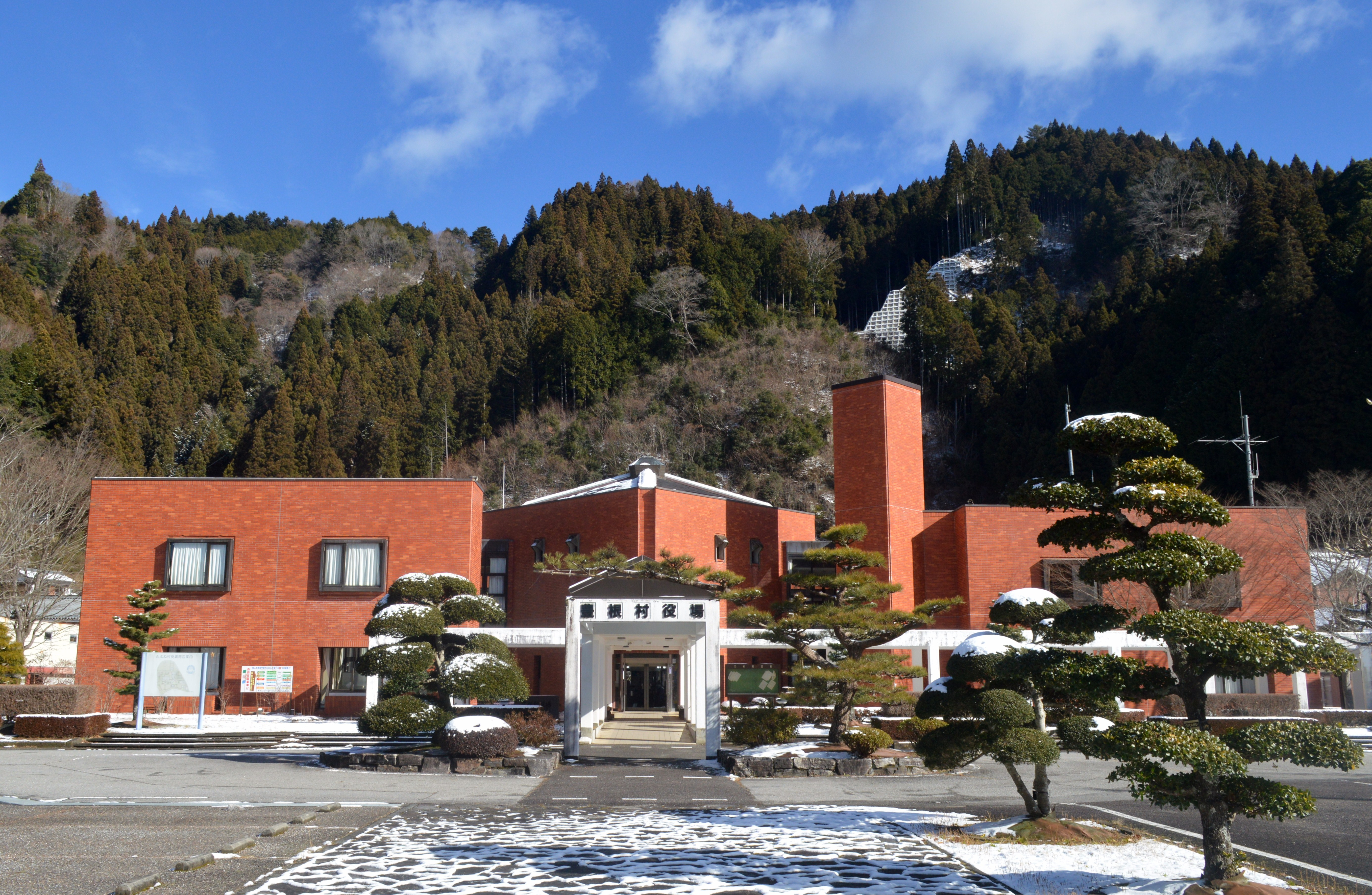 愛知県北設楽郡豊根村の豊根村役場。